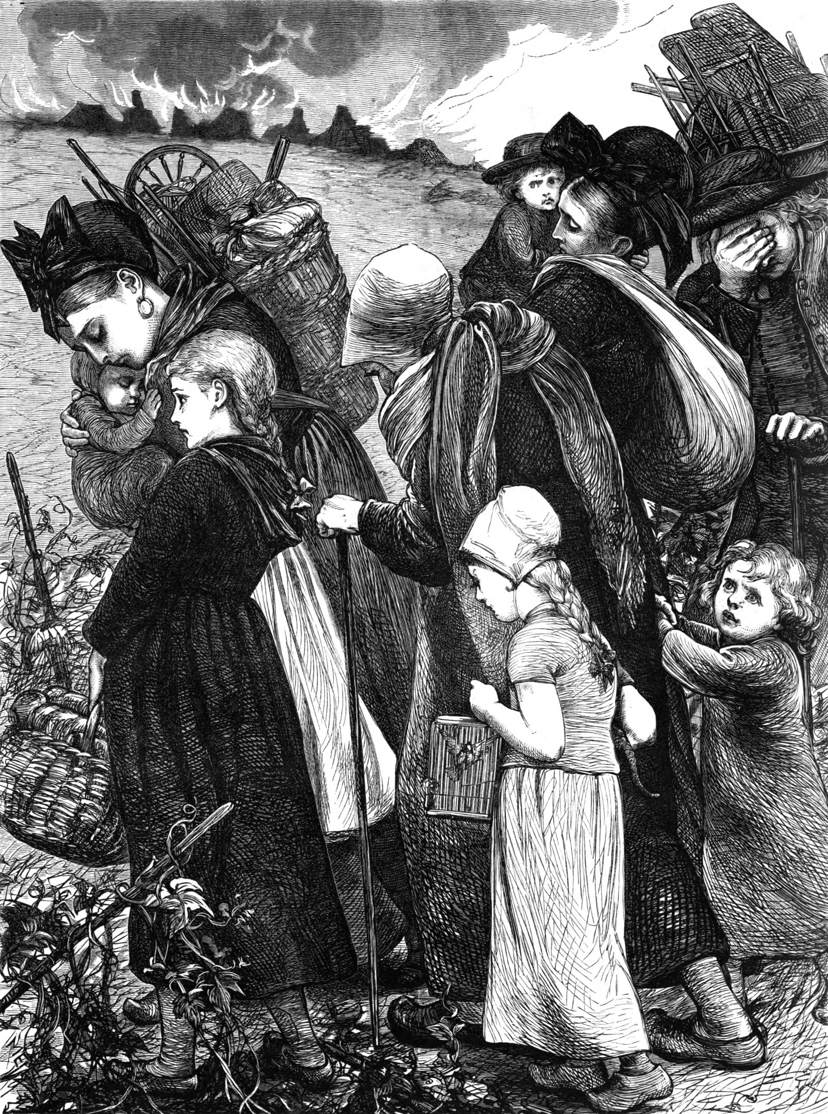 Famille éplorée fuyant Bazeilles en feu